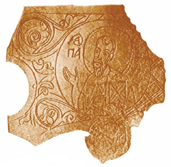 Медная пласціна з выявай апостала Паўла. Ніжняя царква ў Гродне